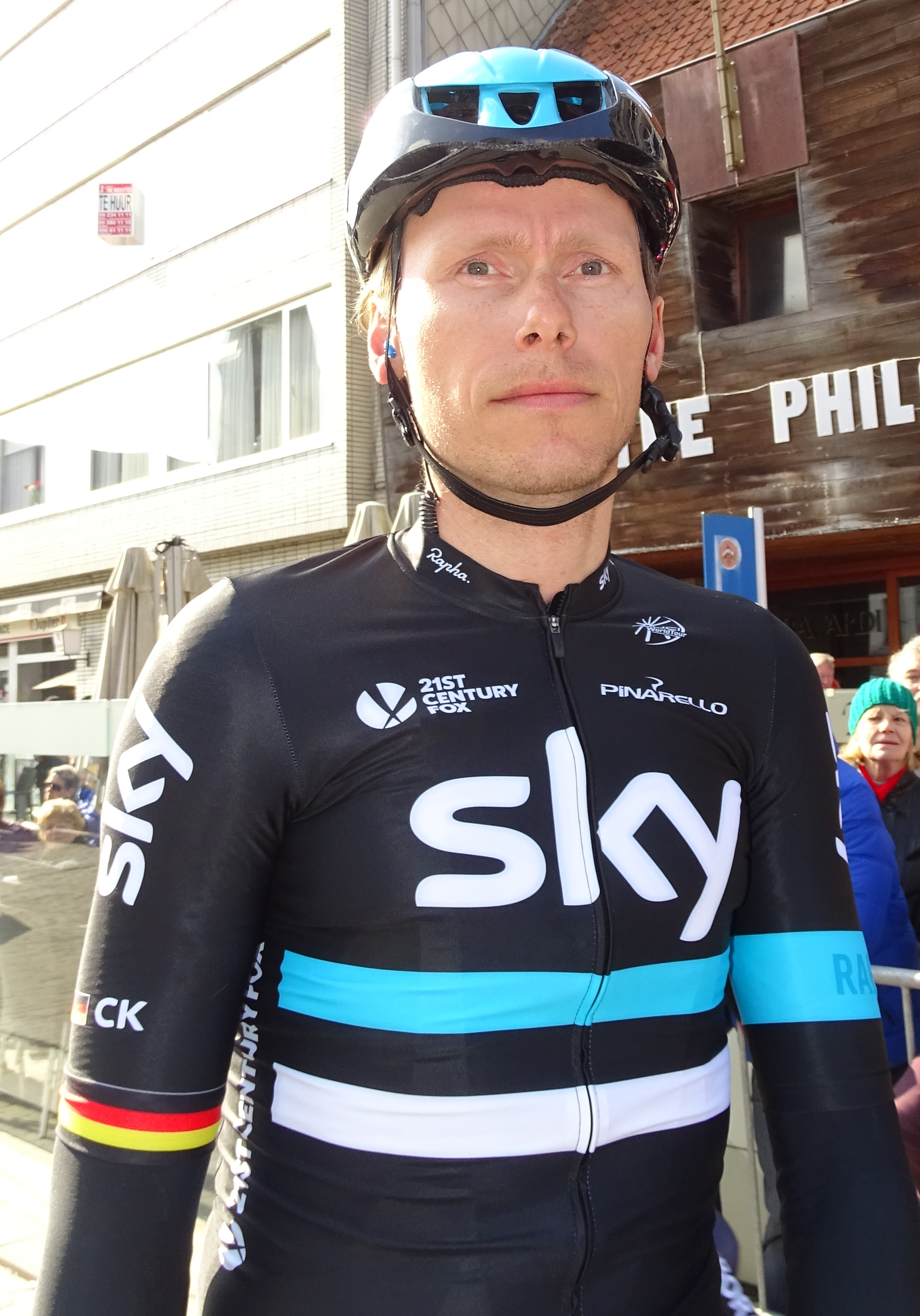 Reportage réalisé le mercredi 16 mars à l'occasion du départ de la Nokere Koerse 2016 à Deinze, Belgique.